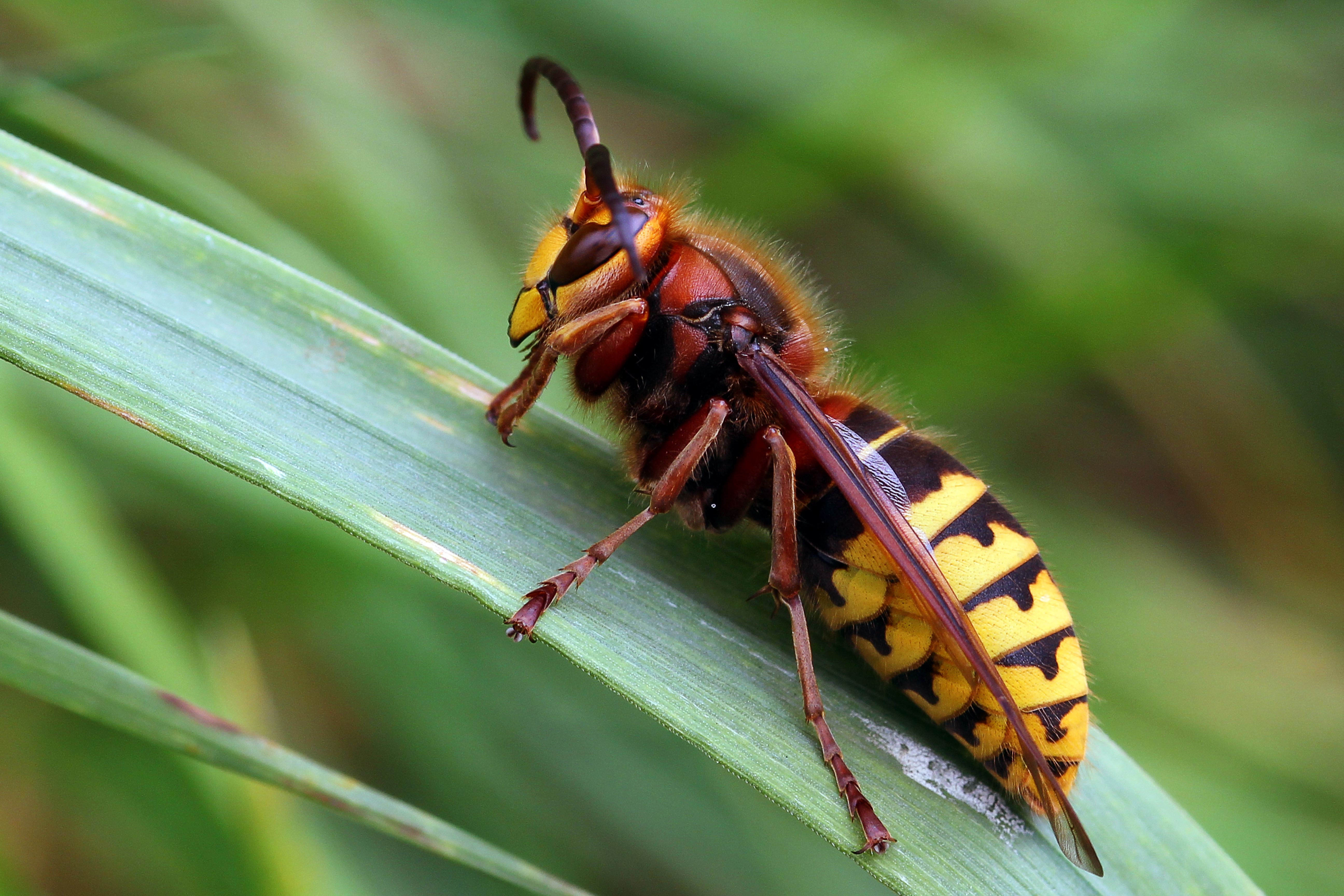 Macroaufnahme einer Hornisse